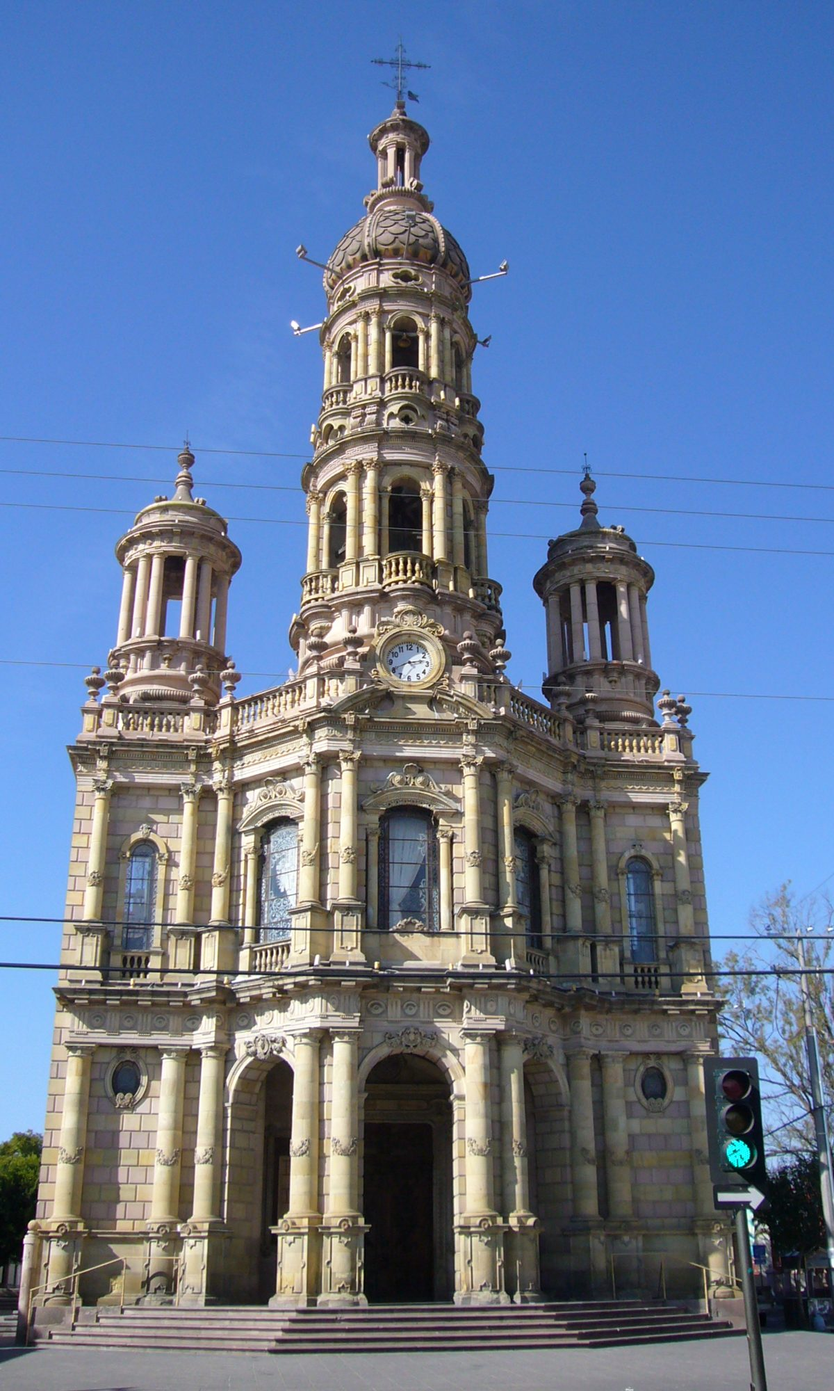 Vista diurna de la fachada del Templo de San Antonio, Aguascalientes